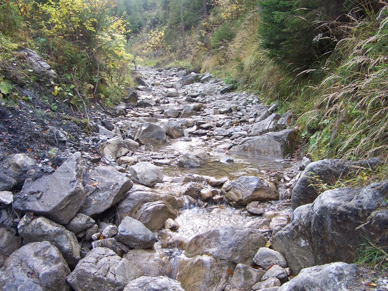 Skalski Potok(Małe Pieniny)